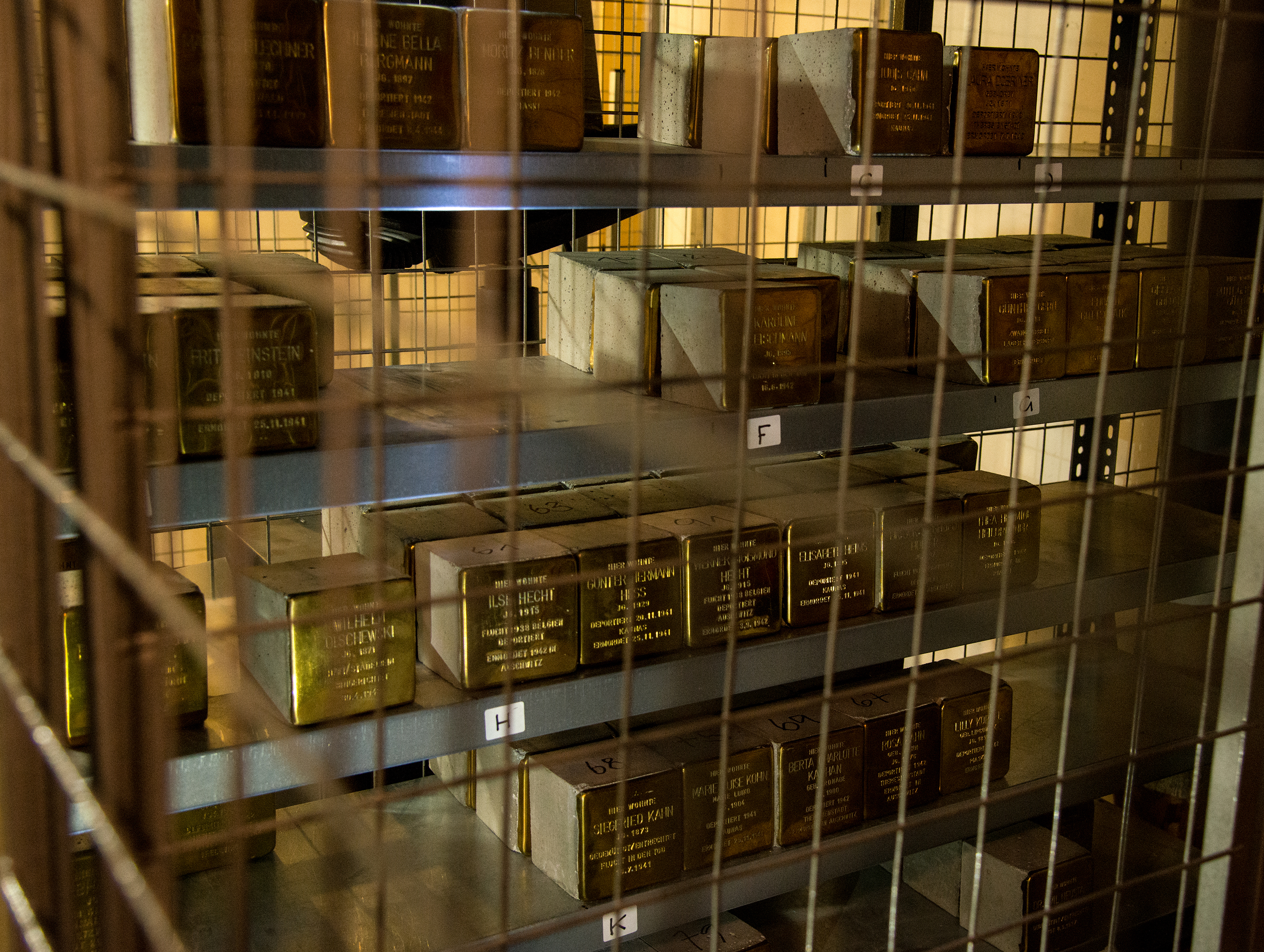 Eingelagerte Stolpersteine in München